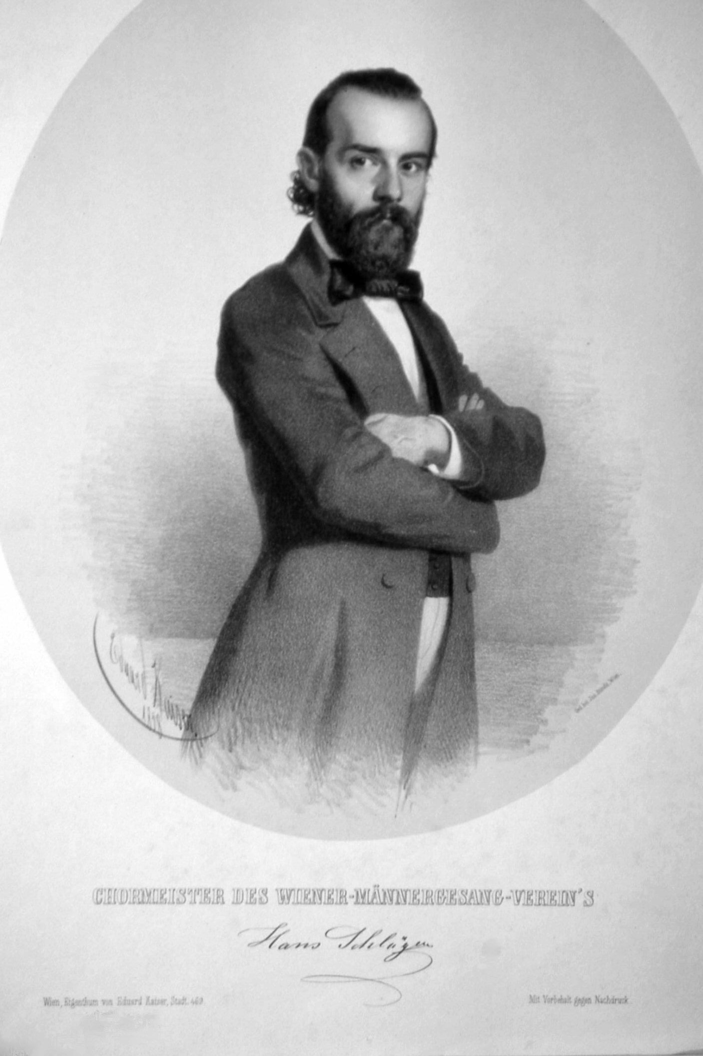 Hans Schläger (1820-1885), Musiker, Komponist, Chorleiter, Dirigent. Lithographie von Eduard Kaiser, 1858